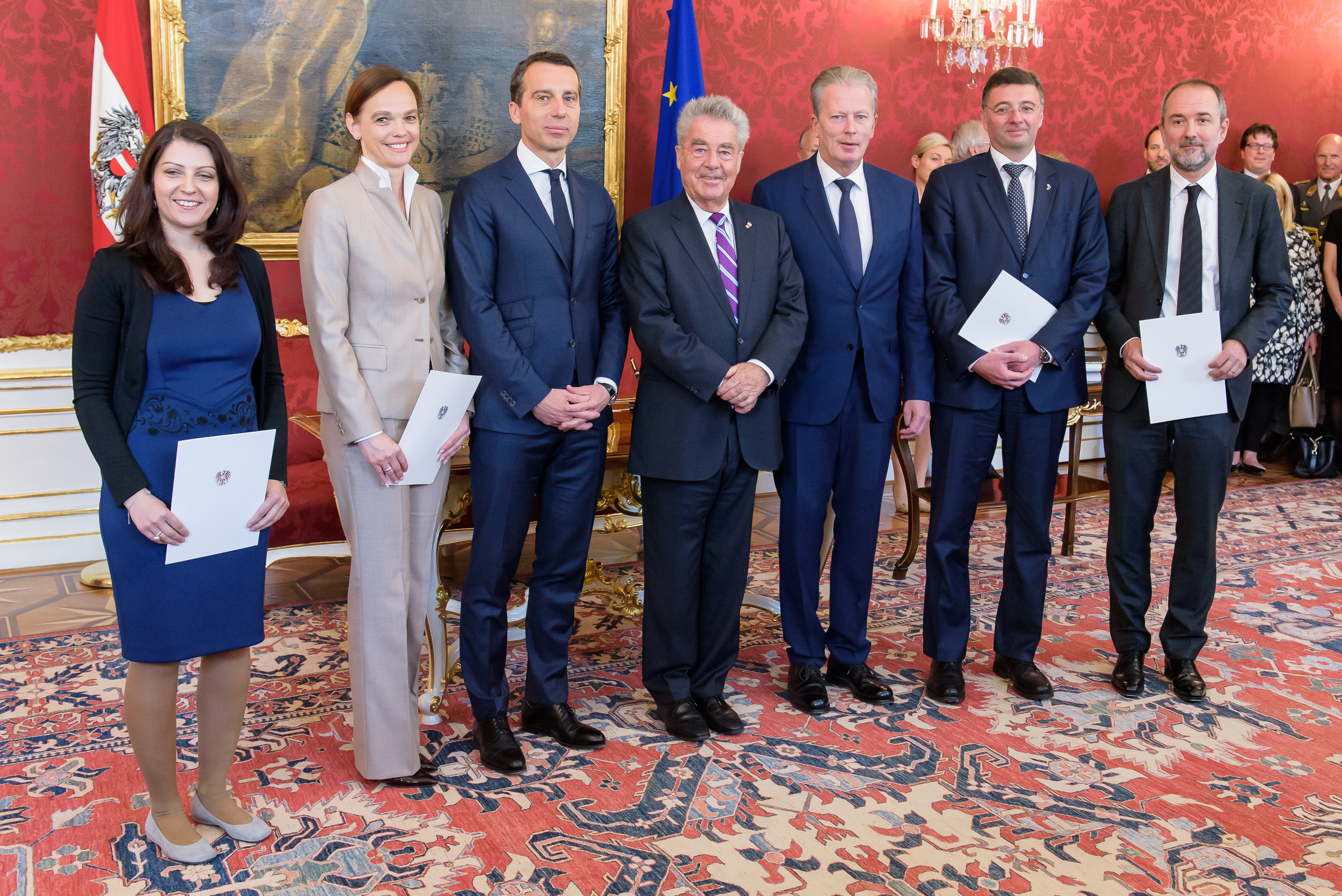 Angelobung der neuen Regierungsmitglieder Thomas Drozda, Muna Duzdar, Sonja Hammerschmid, und Jörg Leichtfried mit Bundespräsident Heinz Fischer, Bundeskanzler Christian Kern und Vizekanzler Mitterlehner